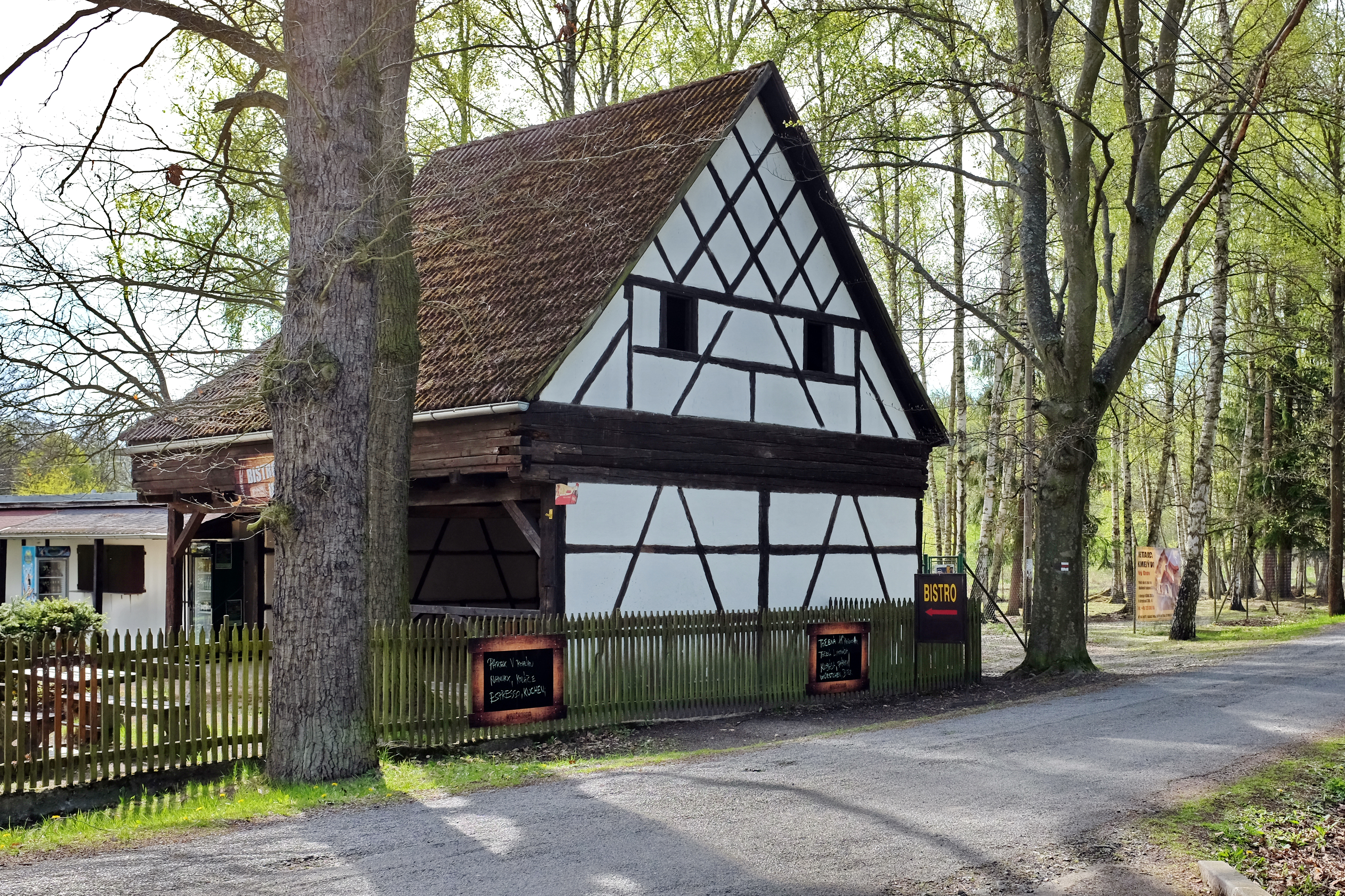 Kateřina, část obce Skalná, okres Cheb